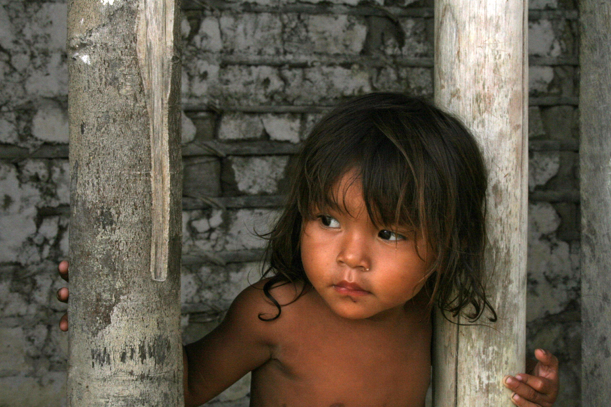 Niña de la etnia Yekuana